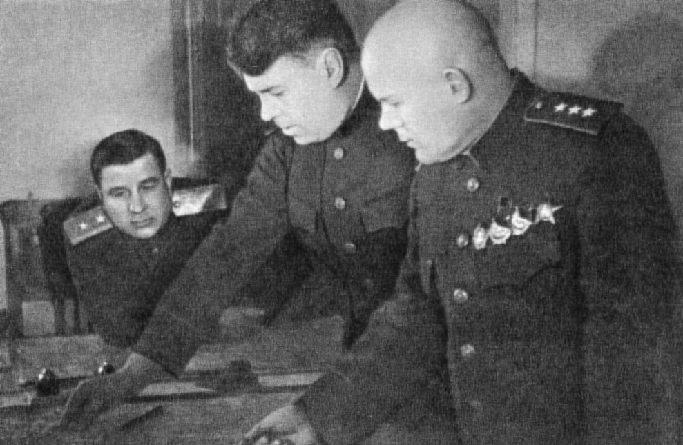 Командующий Воронежским фронтом генерал-полковник Ф.И. Голиков, представитель Ставки ВГК генерал-полковник А.М. Василевский и член Военного совета фронта генерал-лейтенант Ф.Ф. Кузнецов в период проведения операций на Верхнем Дону (операция «Звезда» и Харьковская оборонительная операция)